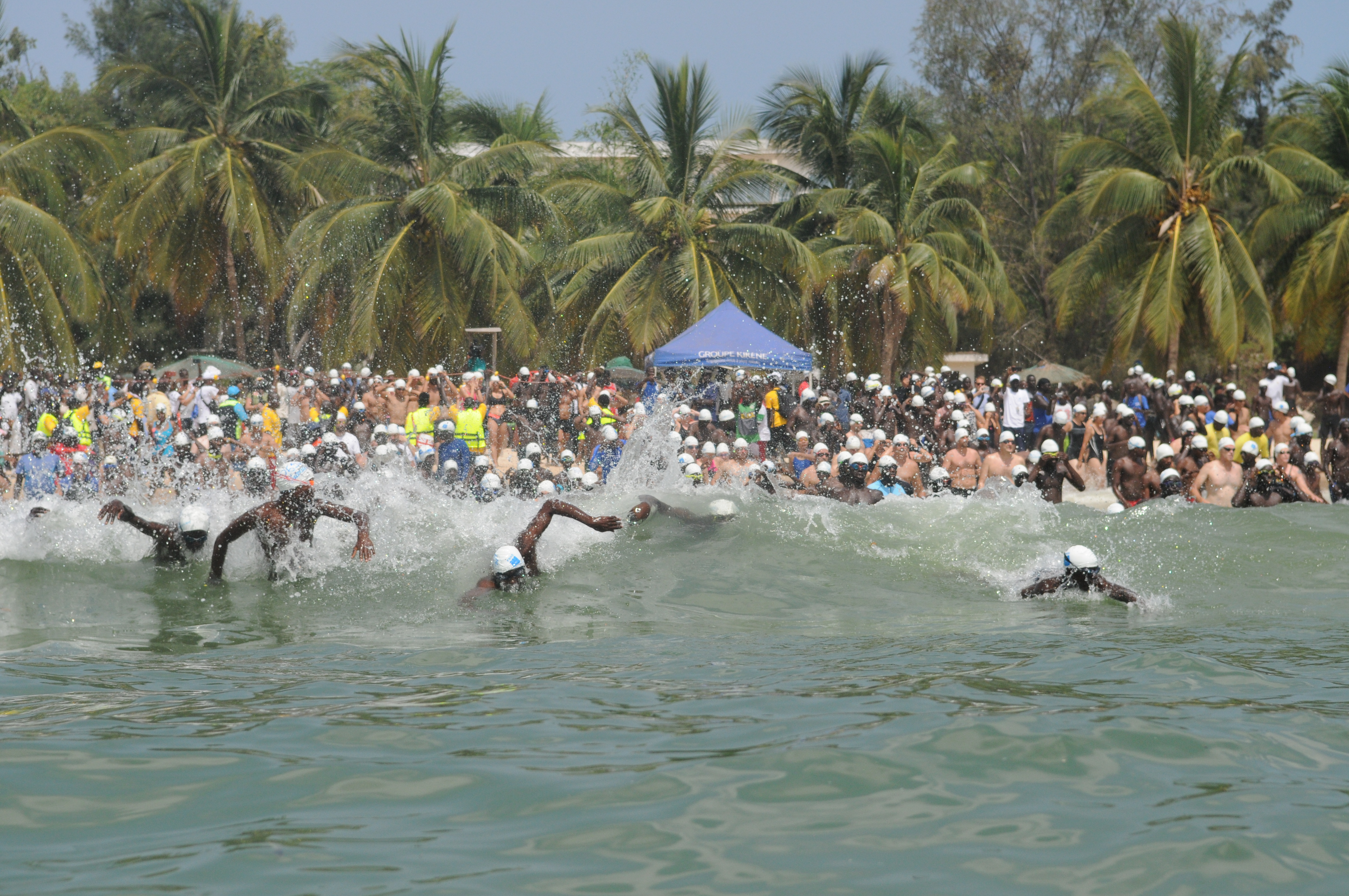 départ de la "& âme édition de la course de natation entre Dakar et Corée